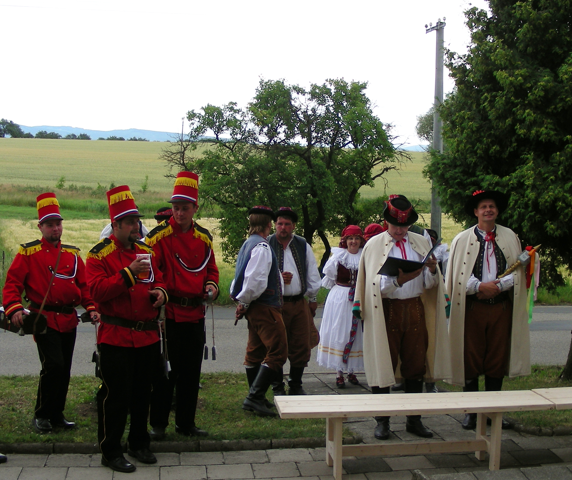 Rychtář a doprovod, Hanácký právo. Vyfoceno v Kostelci u Holešova před domem č.p.: 240, dne 28.6.2008